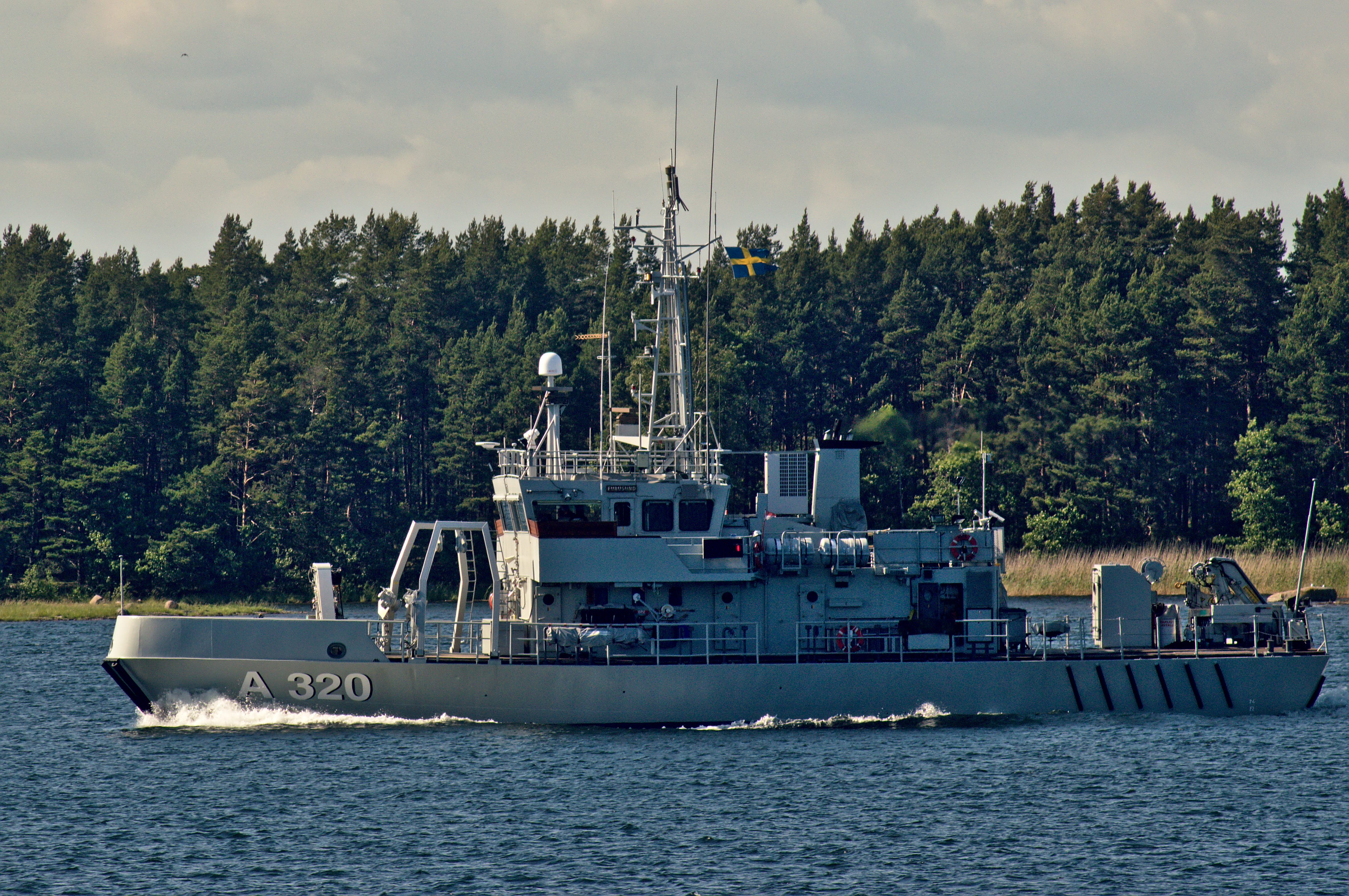 HMS Furusund A320 utanför Ornö juni 2015.